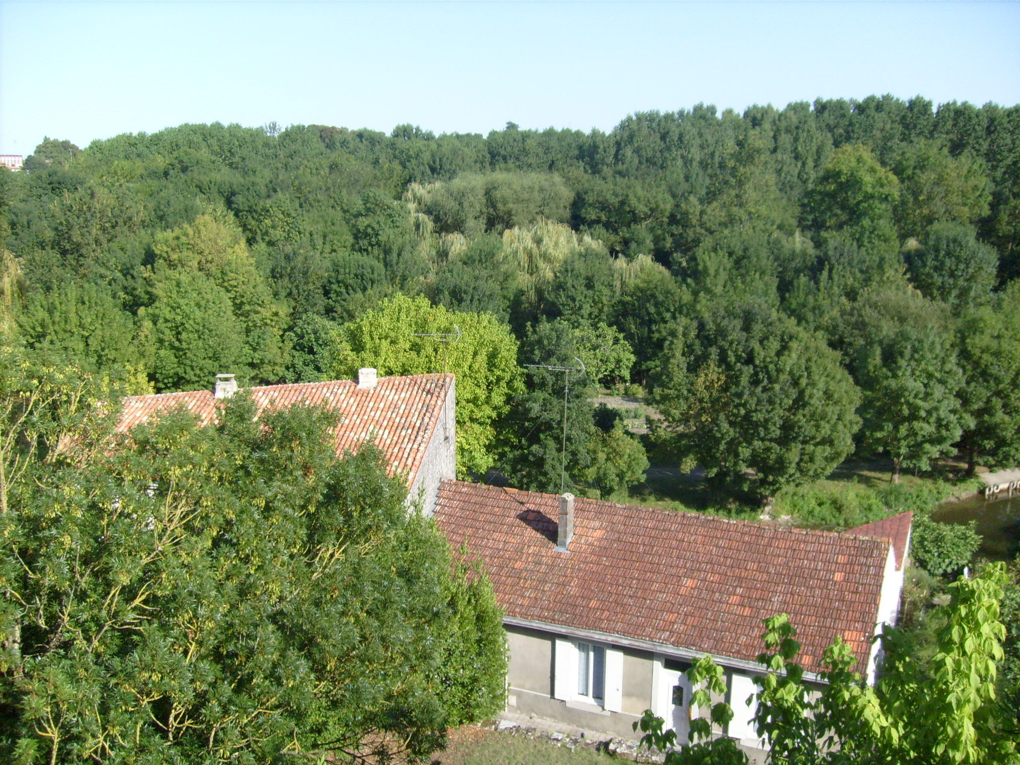 Paysage depuis les remparts de Pons